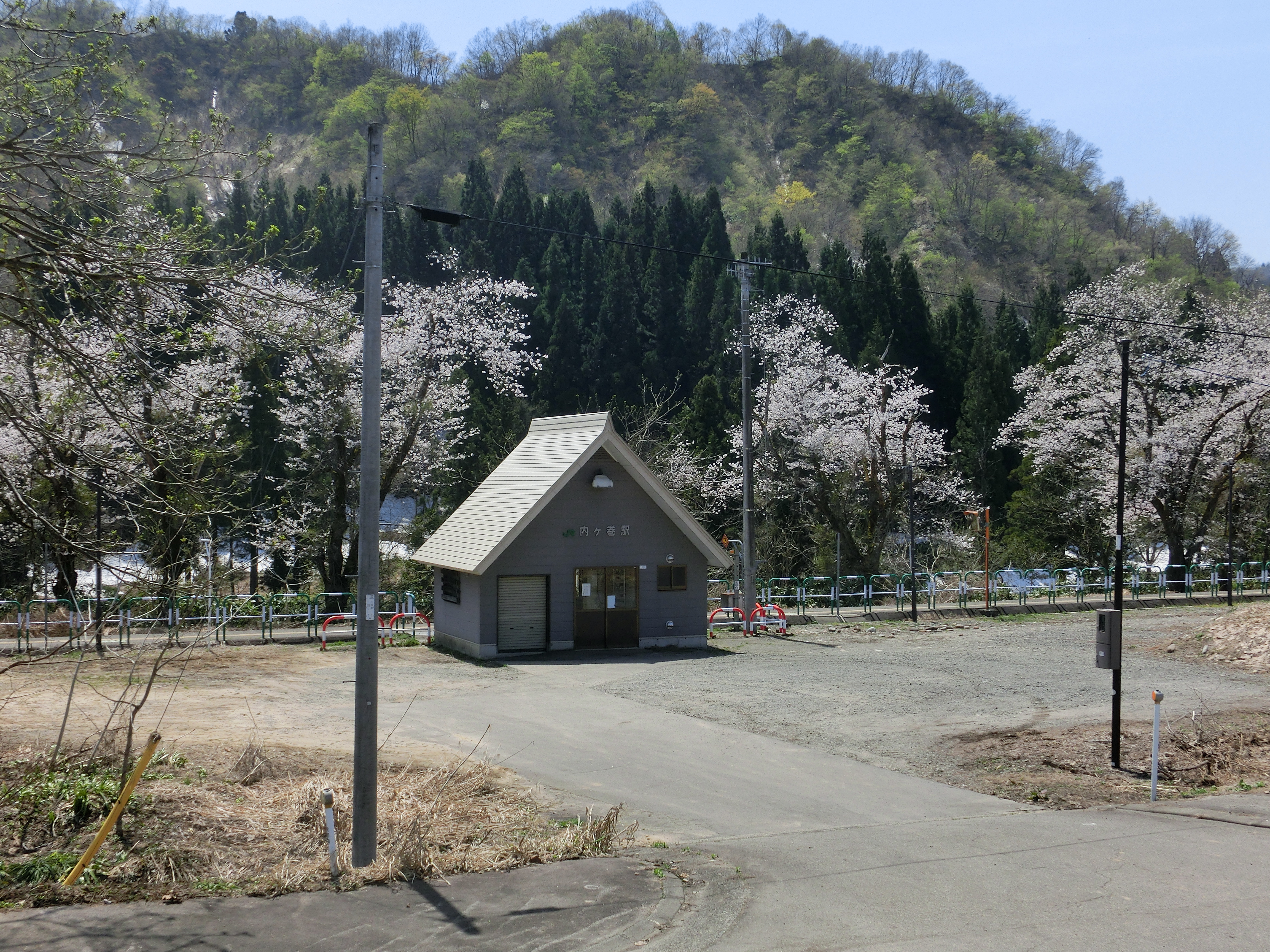 この画像は2018年4月21日投稿者自身によって新潟県道71号小千谷川口大和線路肩法面上より撮影された、新潟県小千谷市にある内ケ巻駅の写真。